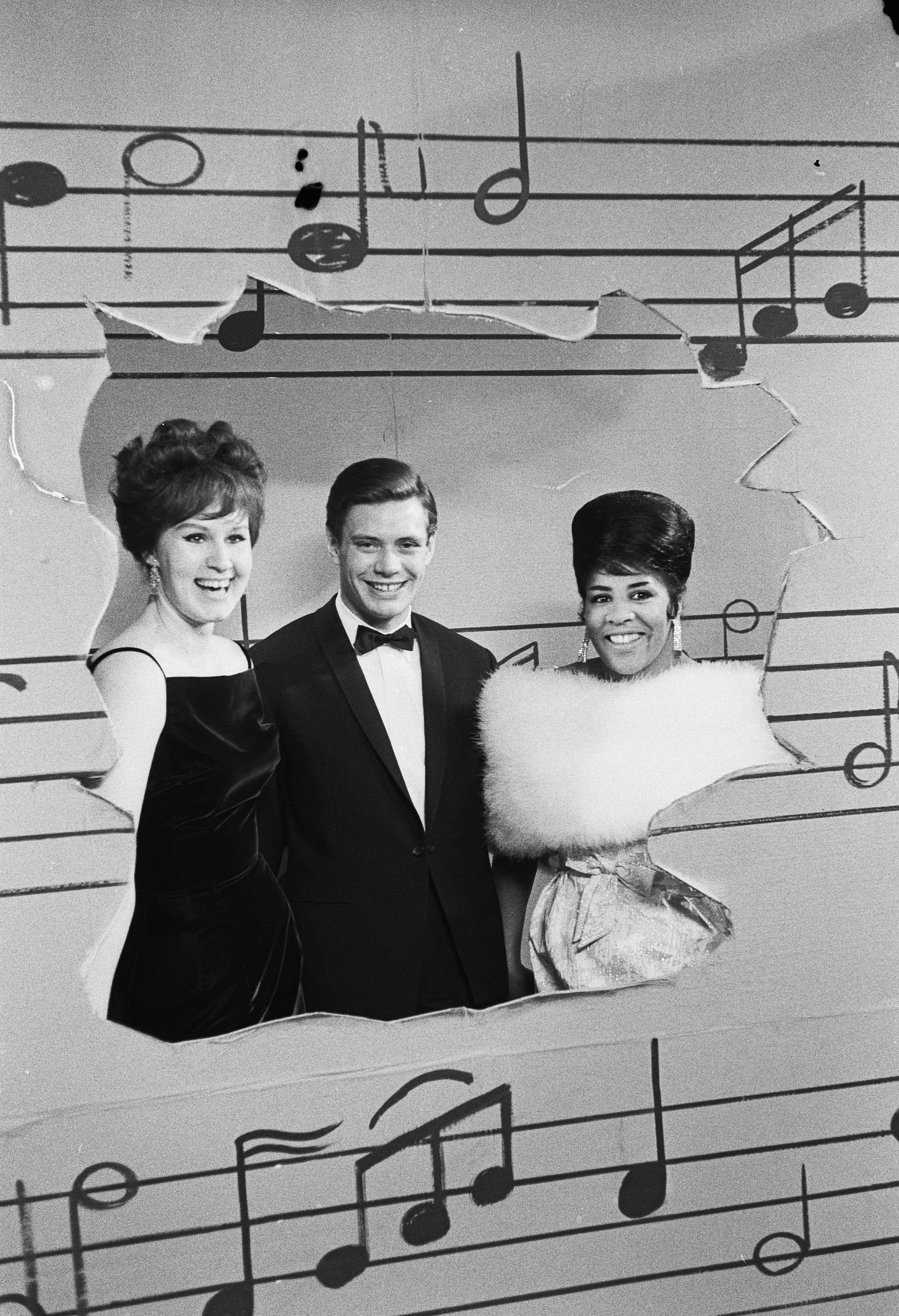 Collectie / Archief : Fotocollectie Anefo Reportage / Serie : [ onbekend ] Beschrijving : VARA-televisie brengt muziekprogramma van Cole Porter . Als solisten treden op Jenny Veeninga , Rob de Nijs , en Milly Scot Datum : 20 september 1963 Trefwoorden : MUZIEKPROGRAMMAS, solisten Instellingsnaam : VARA Fotograaf : Pot, Harry / Anefo Auteursrechthebbende : Nationaal Archief Materiaalsoort : Negatief (zwart/wit) Nummer archiefinventaris : bekijk toegang 2.24.01.05 Bestanddeelnummer : 915-5475